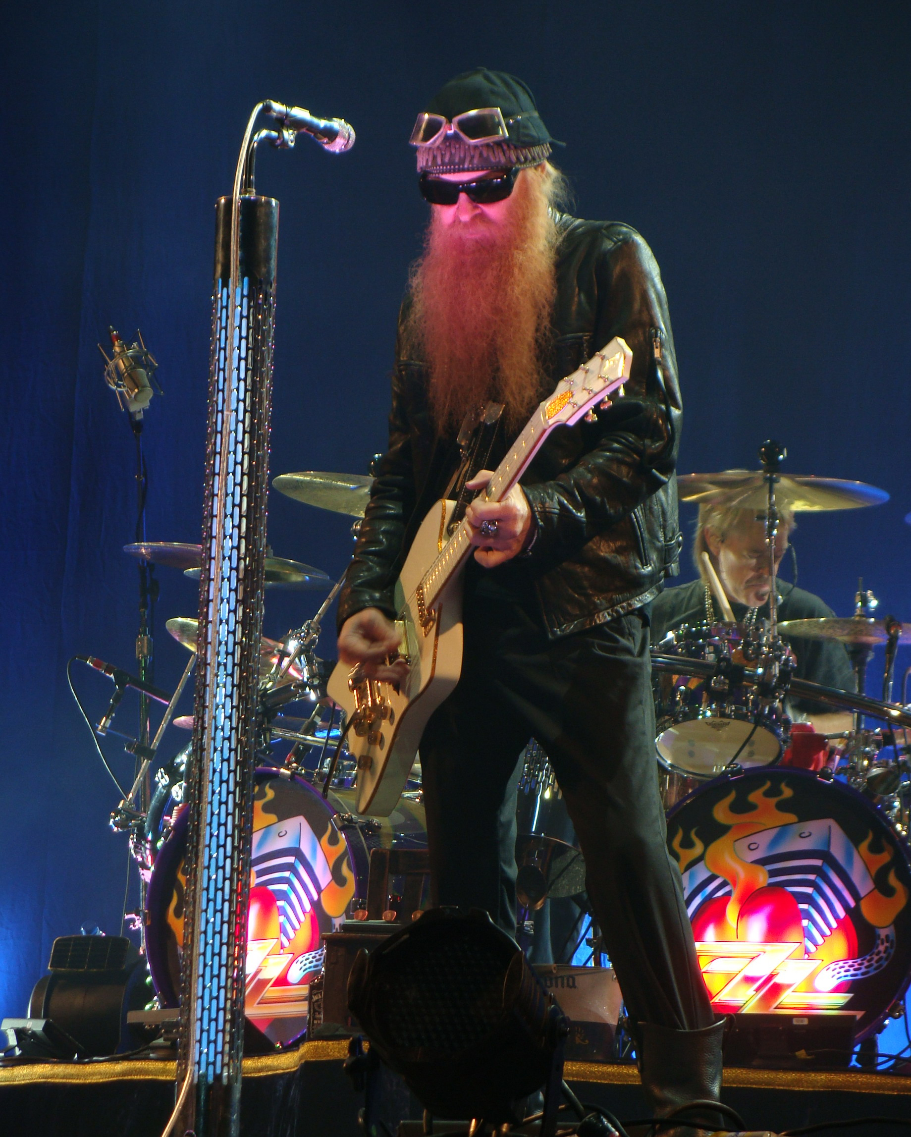 Billy Gibbons, en un concierto de ZZ Top en el Bilbao BBK festival 2008..